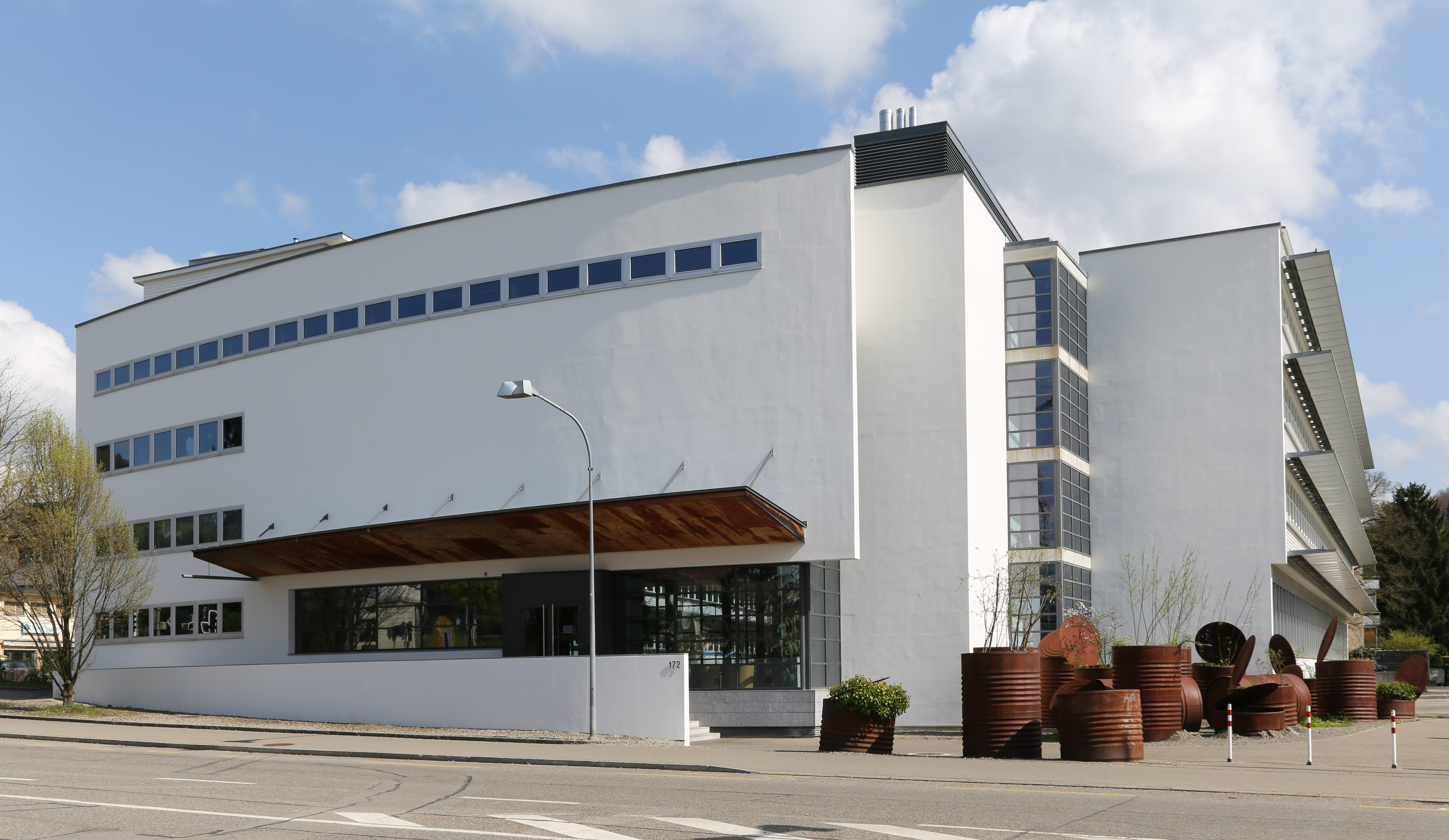 Bundesamt für Umwelt BAFU in Ittigen, Ansicht aus westlicher Richtung